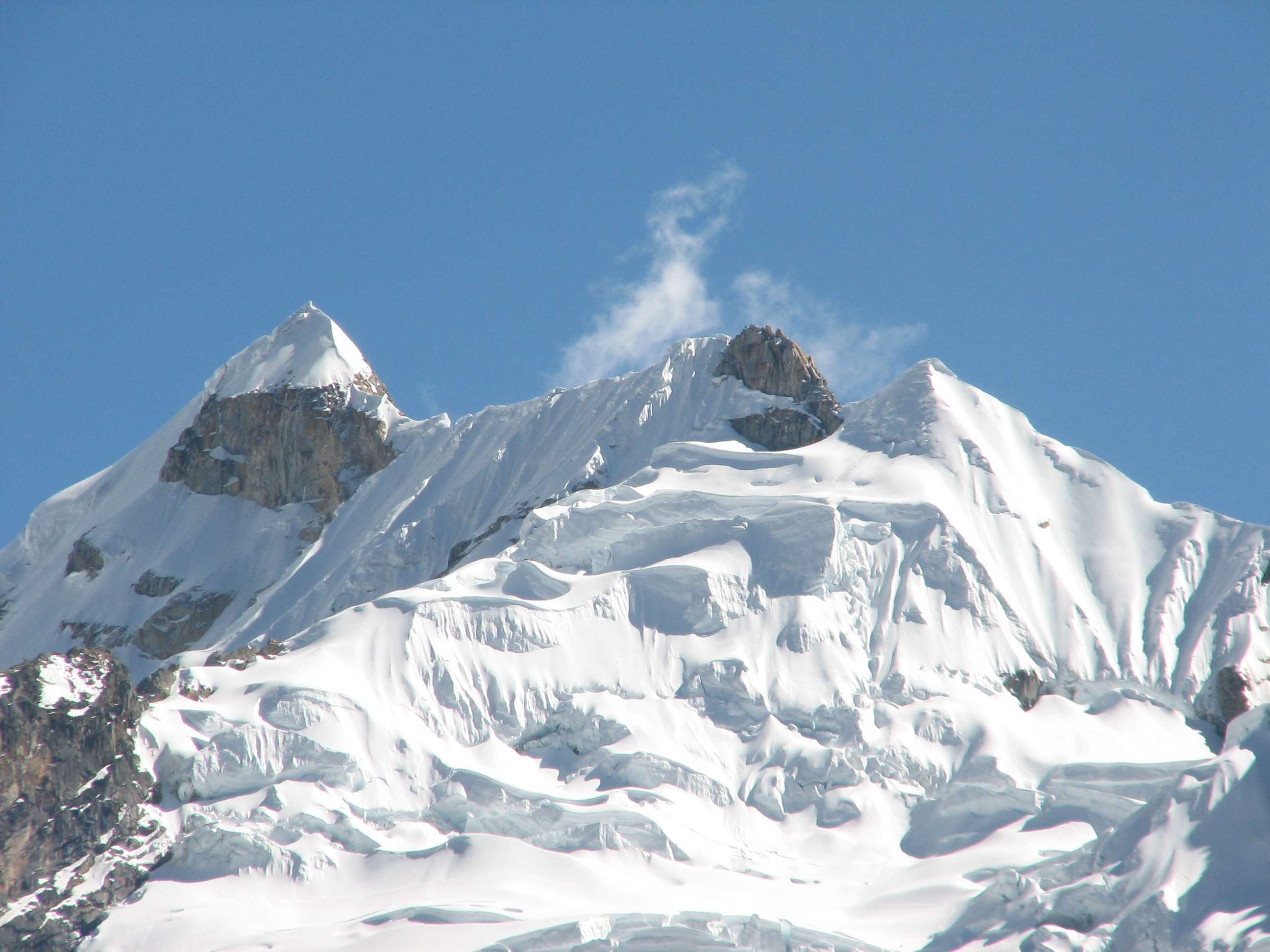 Nev. Sacsarayoc, Cusco, Peru